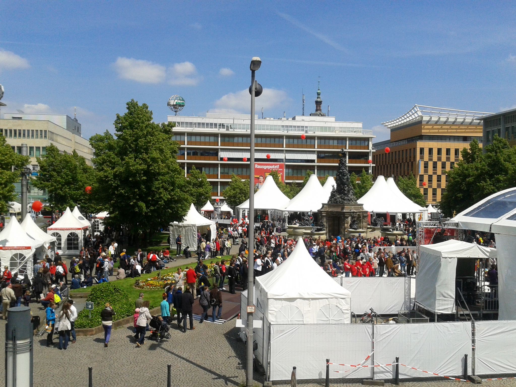 Kirchenmeile während des Katholikentags auf dem Mannheimer Paradeplatz